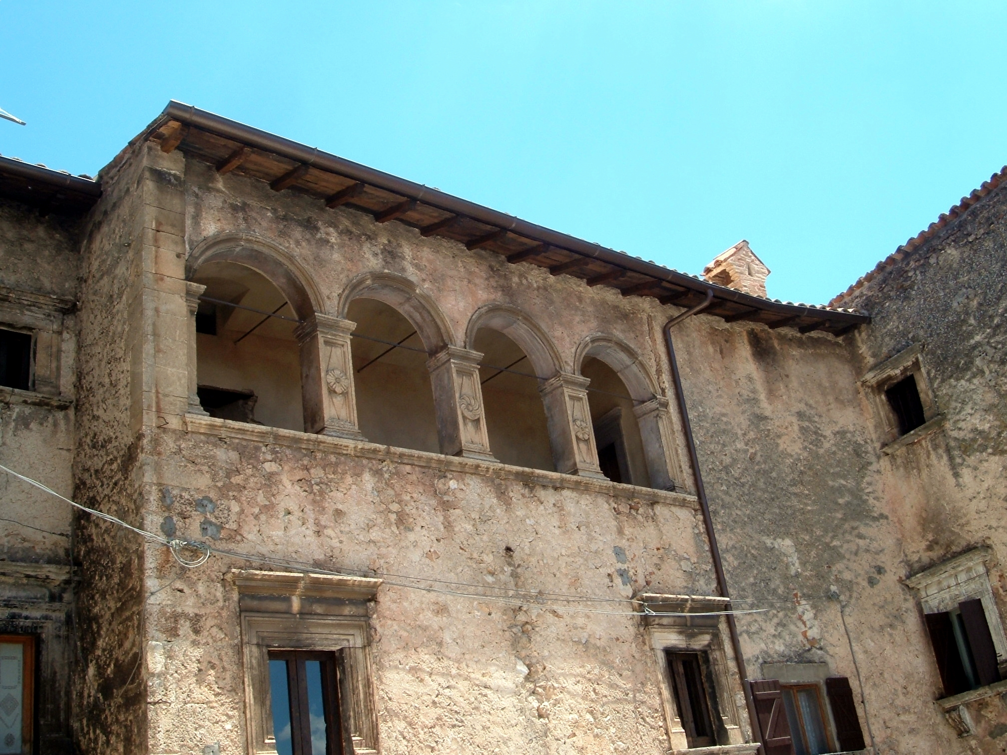 Santo Stefano di Sessanio, Abruzzo, Italia